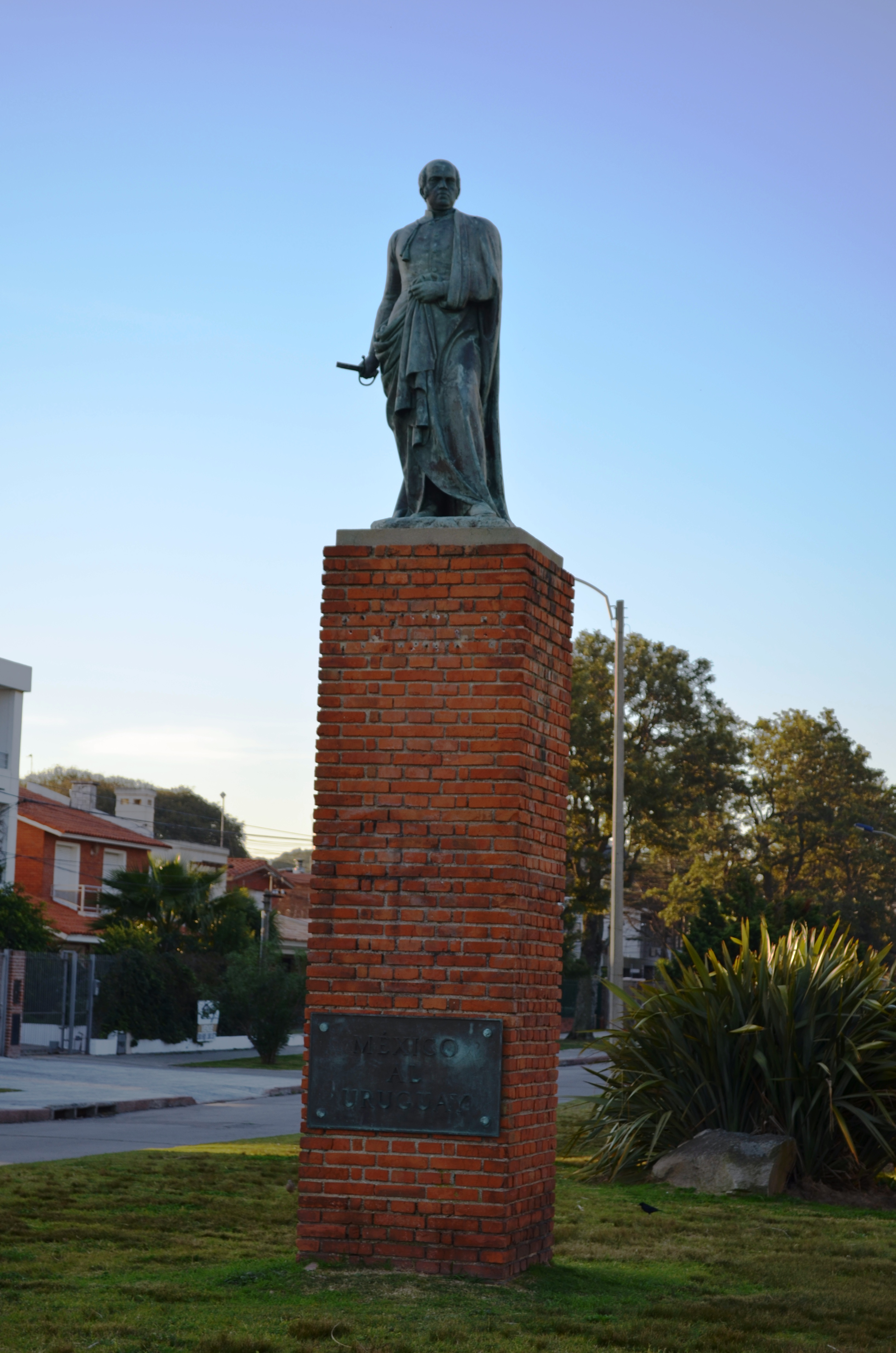 José María Morelos y Pavón. Ubicada en el departamento de Montevideo